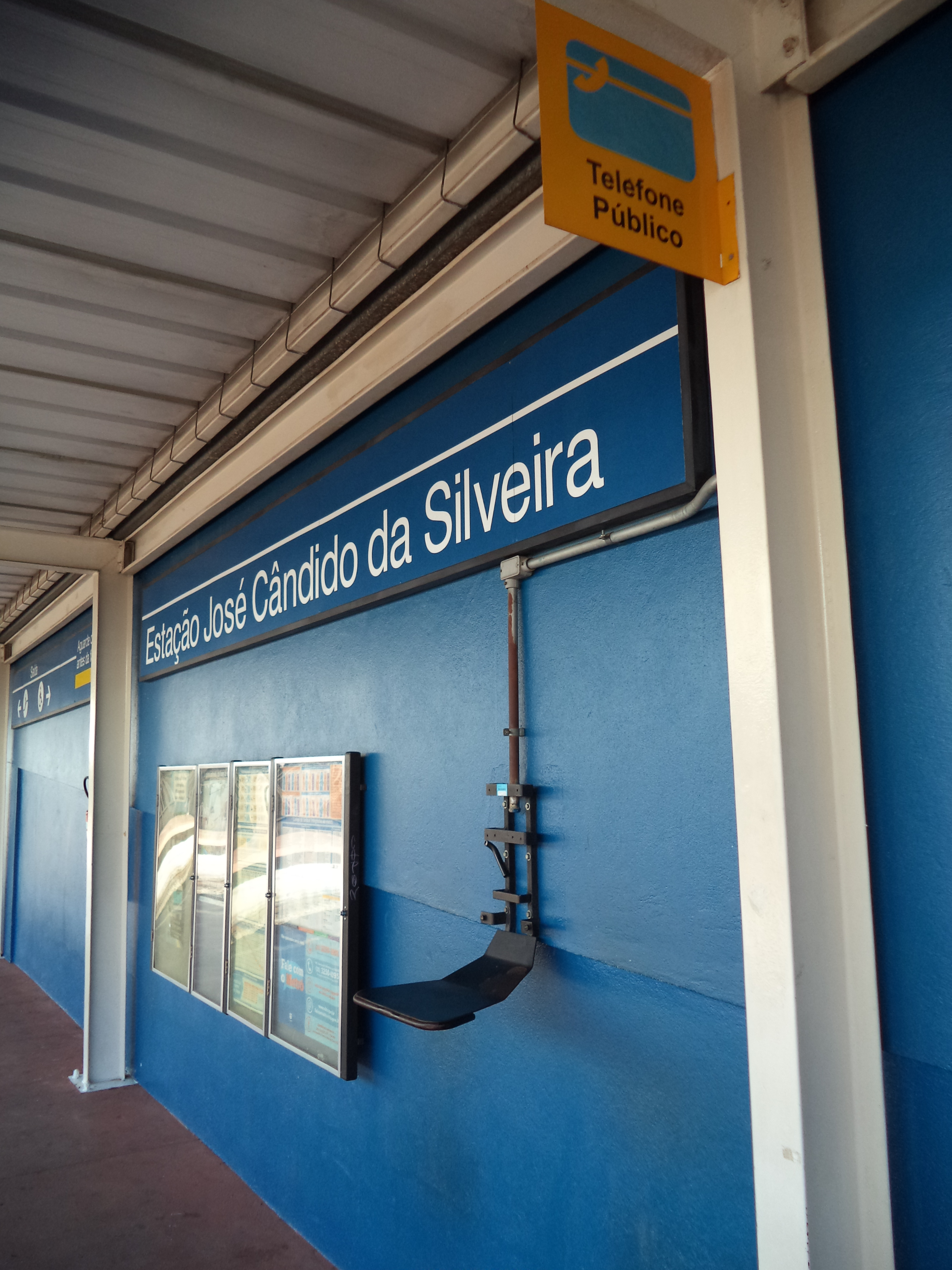 Placa de telefone público sem nenhum telefone, na estação de metrô José Cândido, em Belo Horizonte.